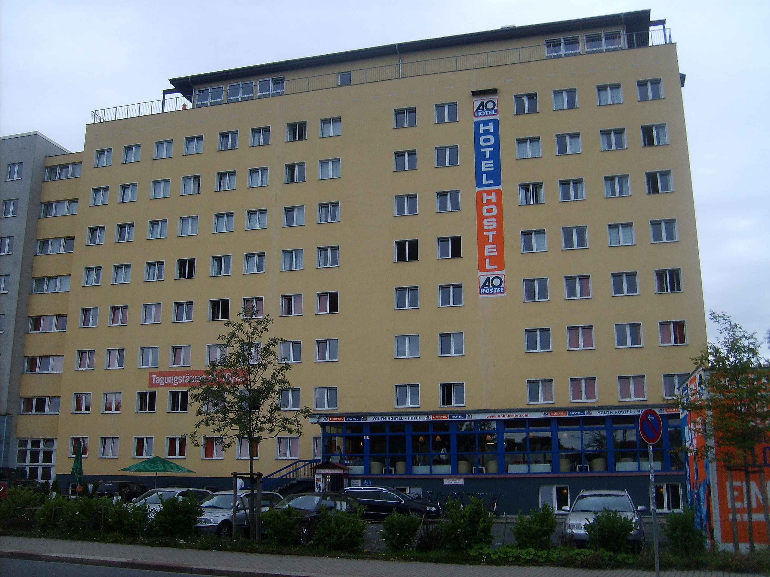 Das A&O Hotel in Dresden